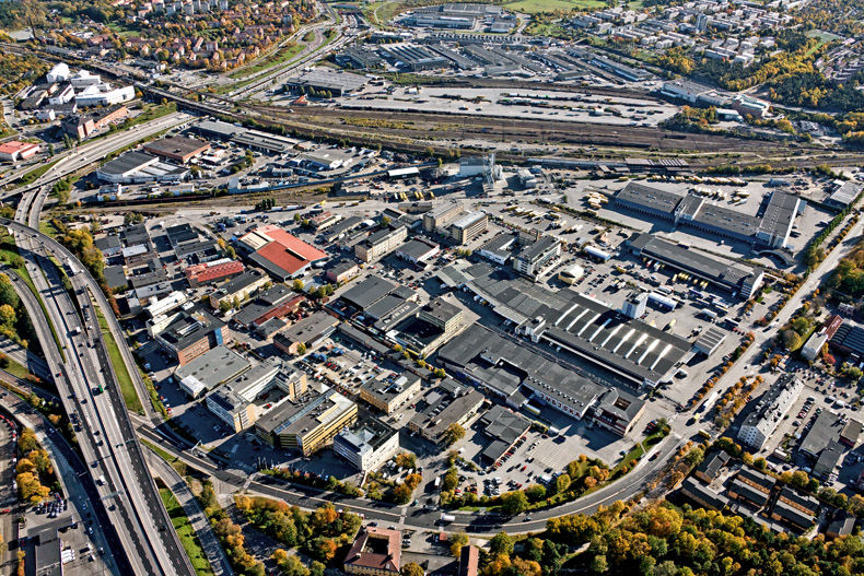 E4 (Södertäljevägen) i förgrunden vid Västberga mot O. Årstalänken till vänster i bild, som korsas av järnvägen till och från Stockholm. Motiv: Västberga Nyckelord: Flygbilder Kategori: Industrimiljö, VägarE4 (Södertäljevägen) i förgrunden vid Västberga mot O. Årstalänken till vänster i bild, som korsas av järnvägen till och från Stockholm.